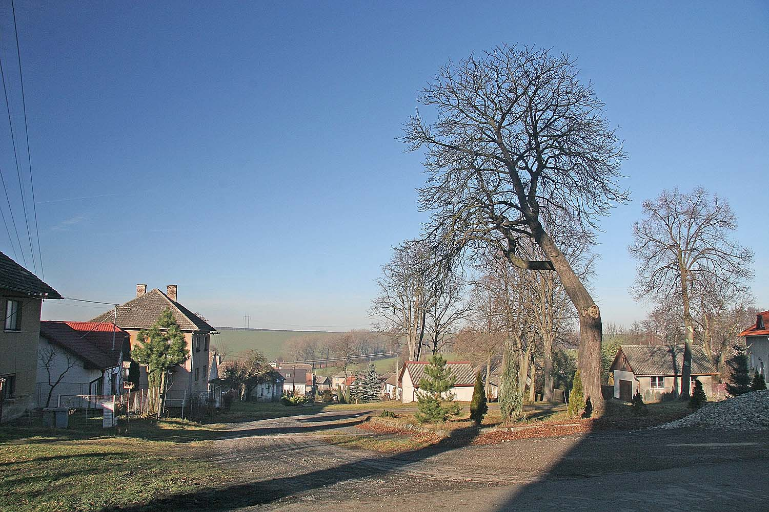 Náves v obci Číhošť, district Havlíčkův Brod autor: Prazak date: 15. 12. 2006